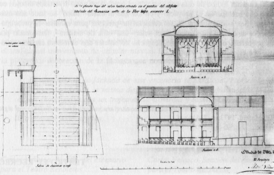 Proyecto de construcción del Teatro El Recreo de Madrid. Museo Municipal de Madrid.